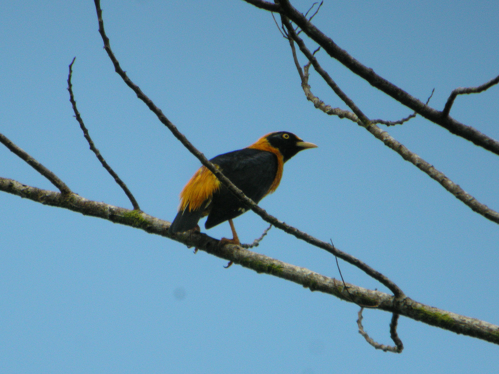 Golden Myna (Mino anais)